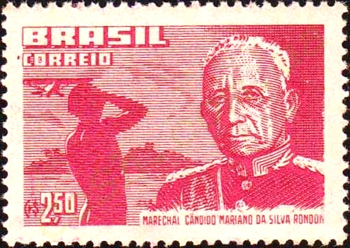 Cândido Mariano da Silva Rondon